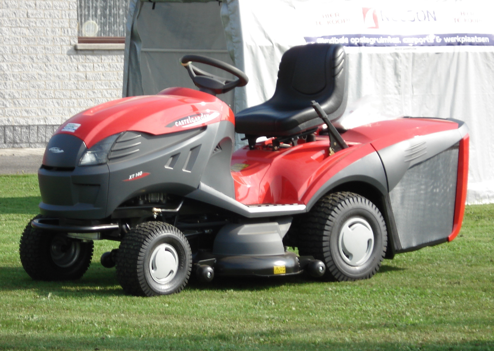 Zitmaaier (Castelgarden XT 140).